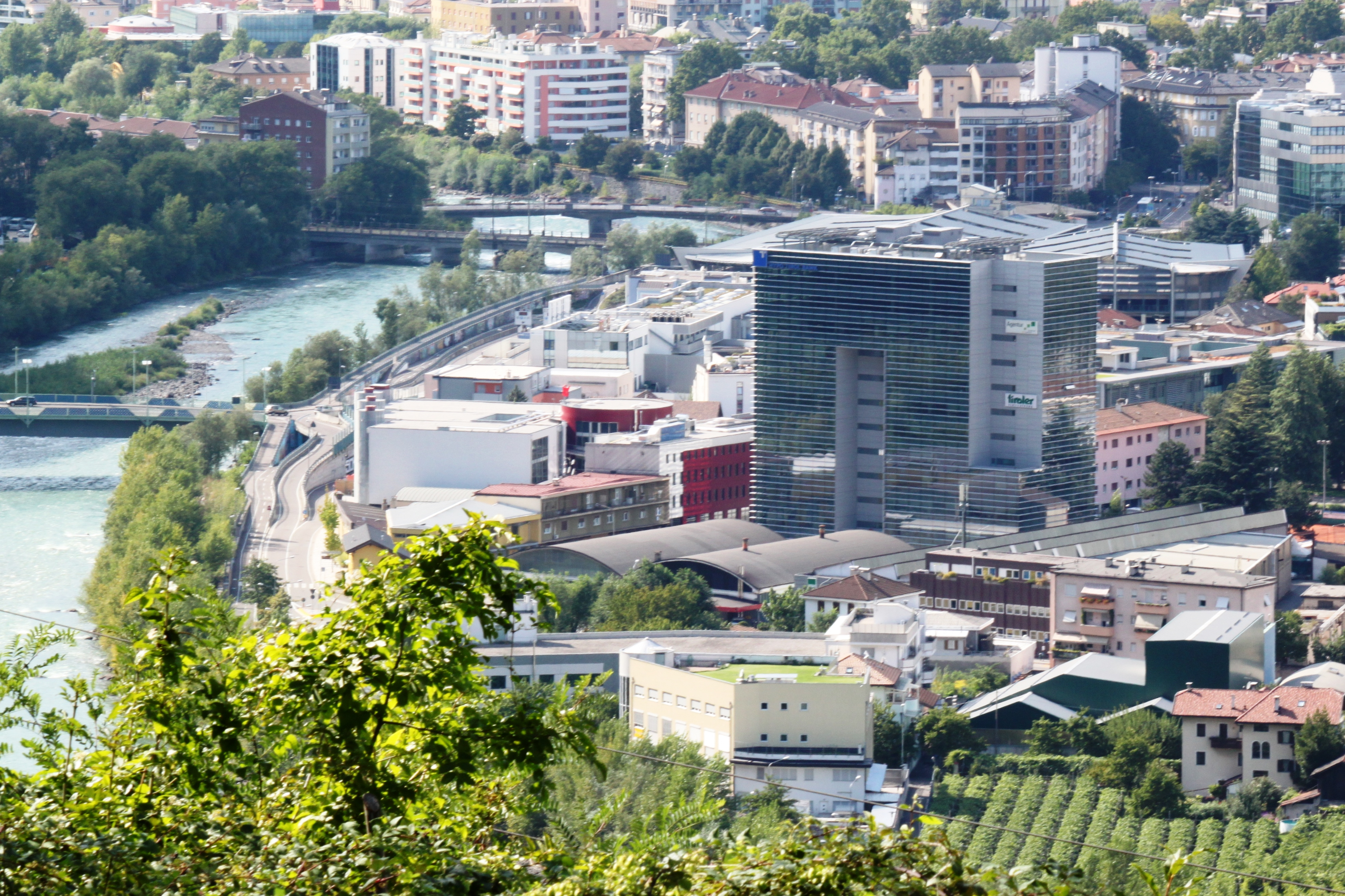 Hypo Tirol City Tower in Bozen Südtirol